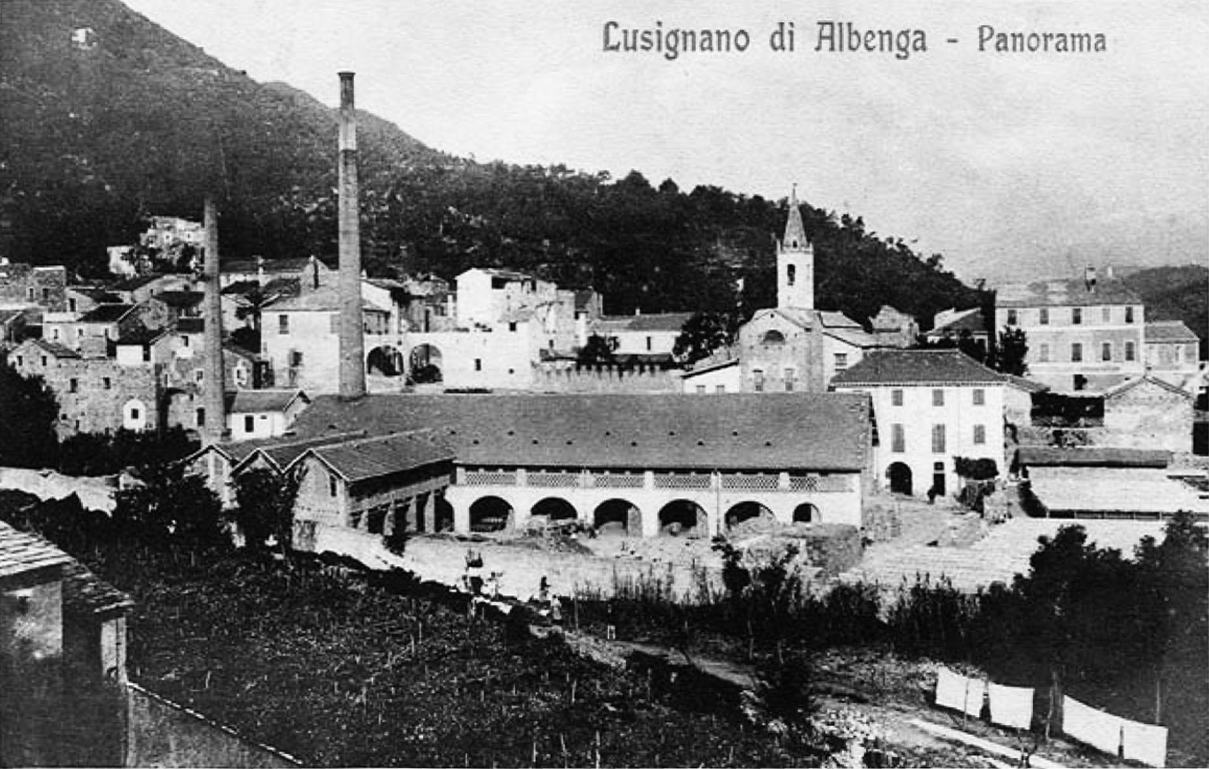 Cartolina d'epoca della fornace Perseghini con il forno Hoffmann